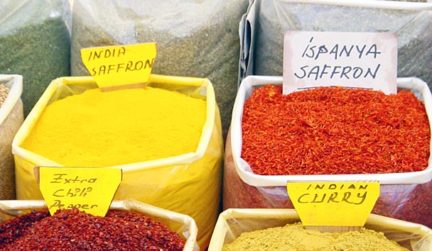 Spices